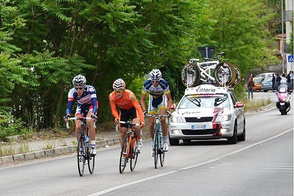 Giro_d'italia_14_05_12_01: Brian Bulgaç, Pierre Cazaux and Martijn Keizer.